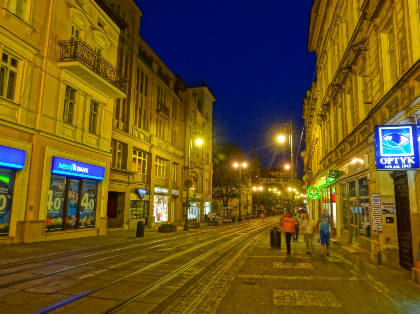 Ulica Gdańska w Bydgoszczy